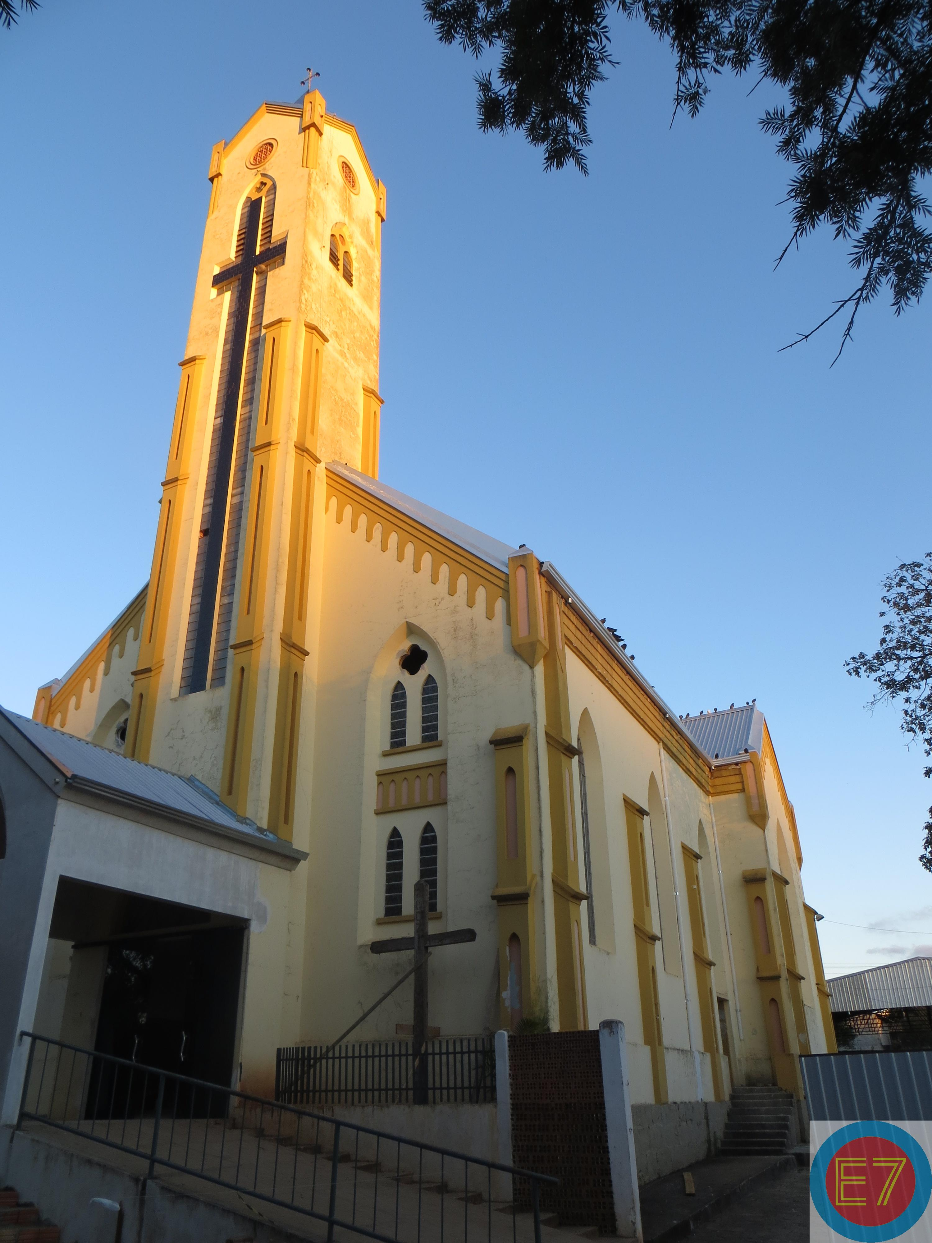 Igreja Matriz do Divino Espírito Santo, em Curiúva, Estado do Paraná, Brasil.